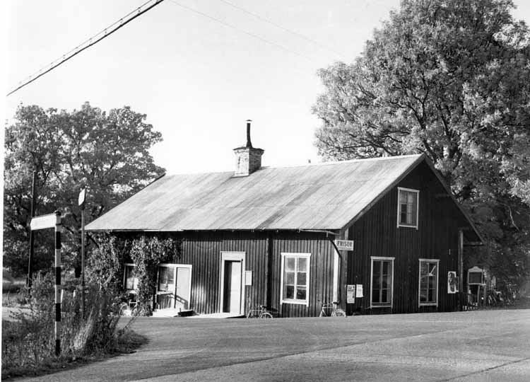 Aspnäs skola i Jakobsberg, Järfälla. 1846 års skolhus vid Aspnäs i korsningen Allévägen 2 och gamla Enköpingsvägen 1 i Jakobsberg. I förgrunden Enköpingsvägen. Allévägen tar av åt vänster till Jakobsbergs samhälle. Bild nr 00445.